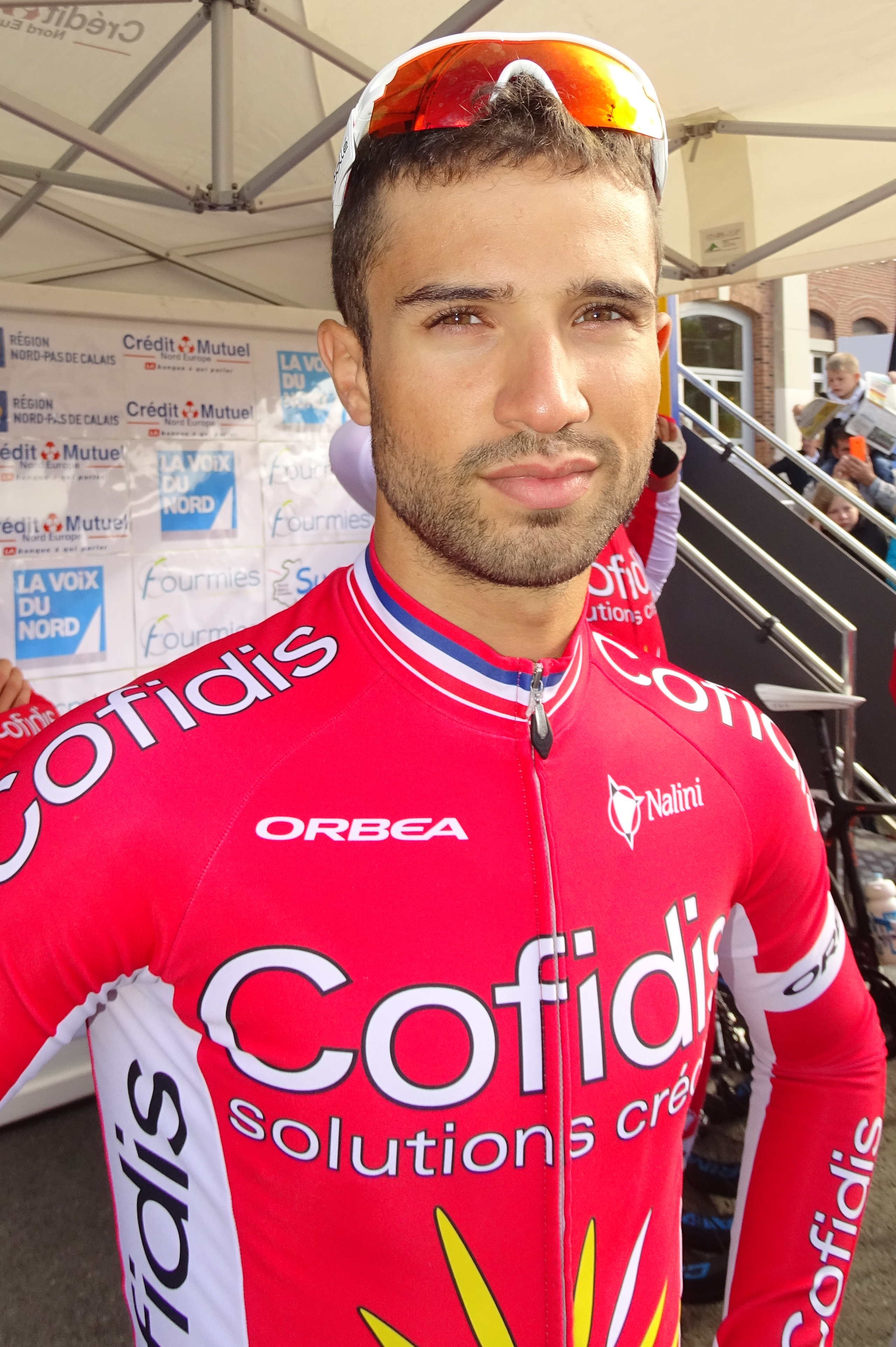 Reportage réalisé le dimanche 6 septembre à l'occasion du départ et de l'arrivée du Grand Prix de Fourmies 2015 à Fourmies, Nord-Pas-de-Calais, France.